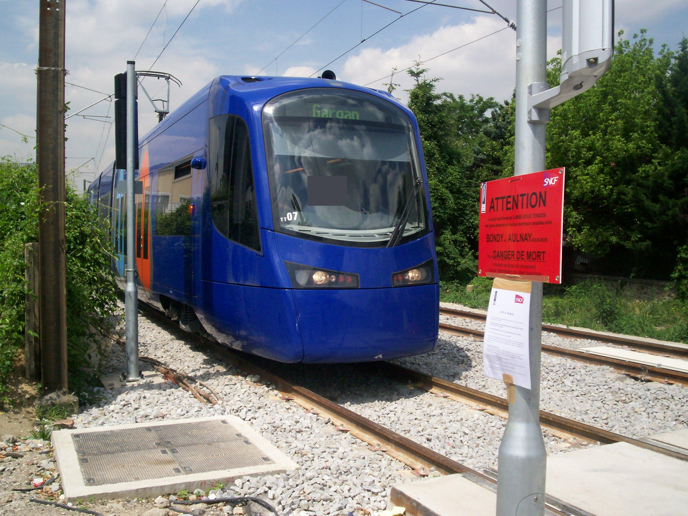 Rame s'approchant de la gare de Bondy lors des essais pré-inauguraux